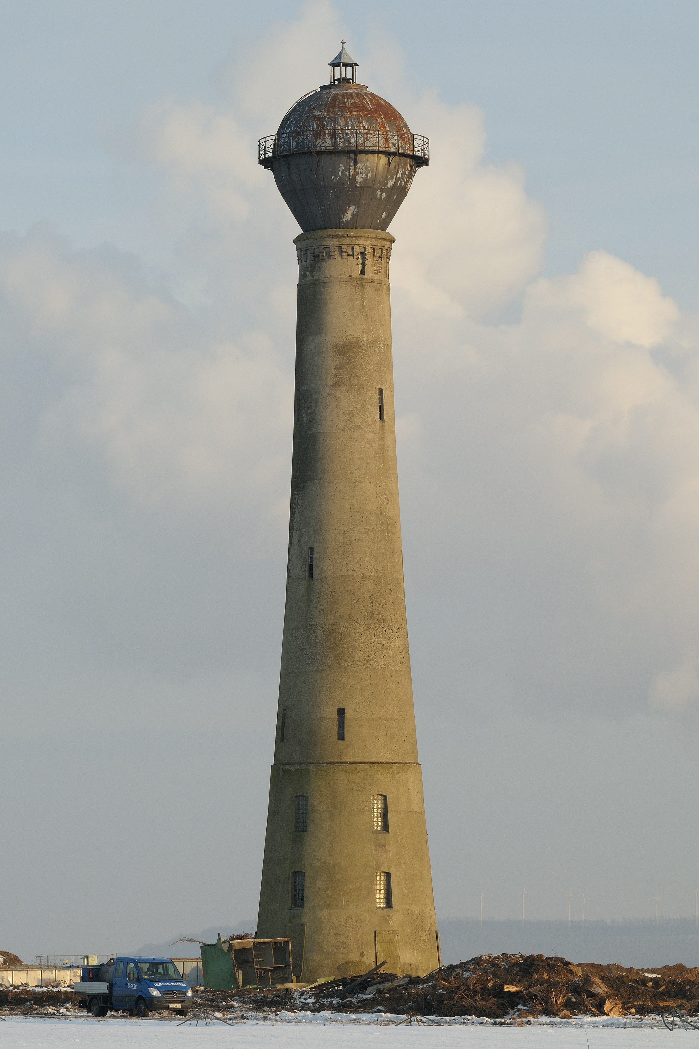 Der Wasserturm in Jüchen-Holz (alt) rel. kurz vor seinem Abriss. Aufgenommen am 04.01.2011, um 16:46 Ortszeit. Im Hintergrund ist die "Vollrather Höhe" zu sehen.